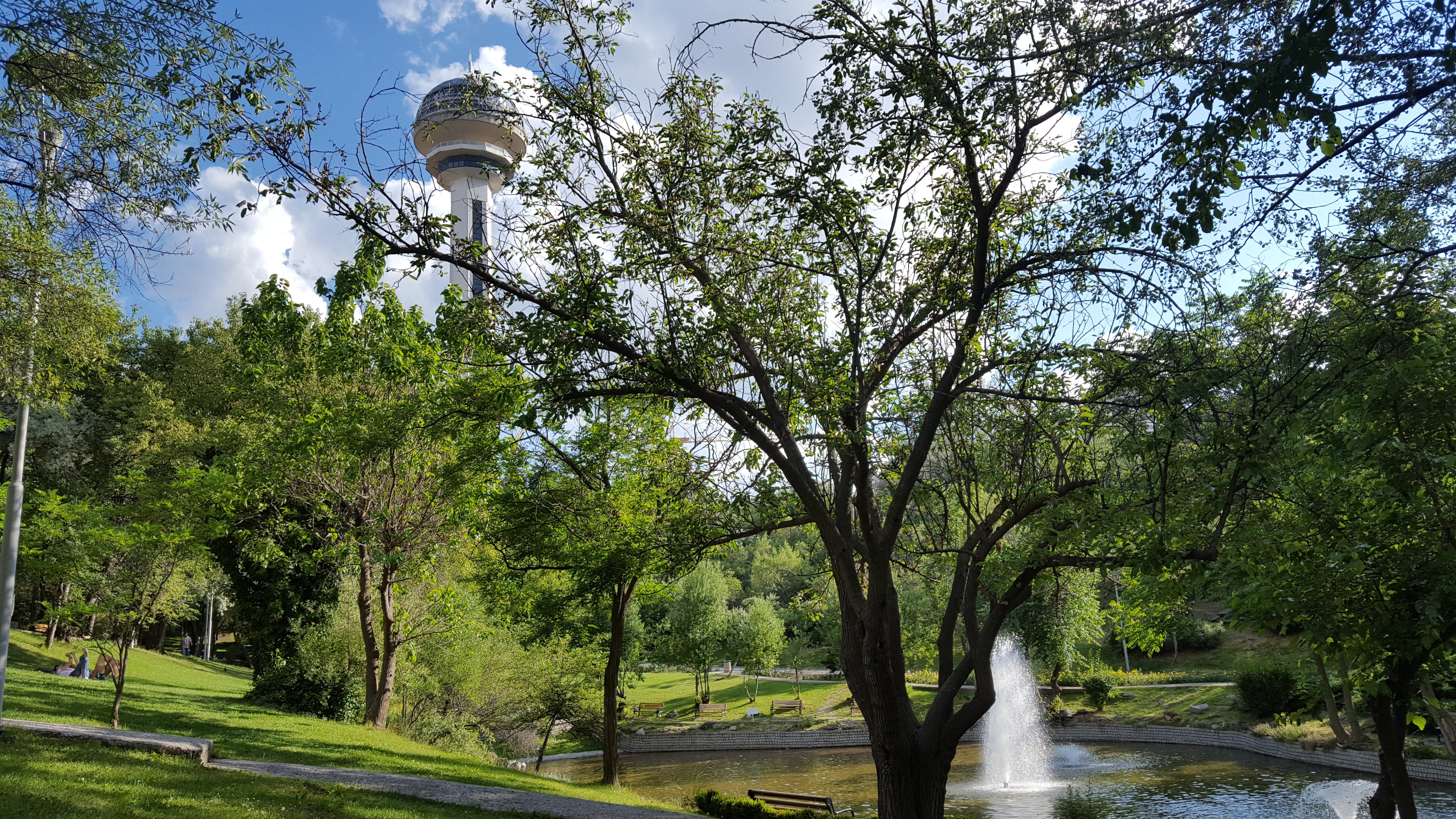 Çankaya ilçesinde bulunan ve 65 bin m²'lik bir alan üzerine kurulu Botanik Parkı